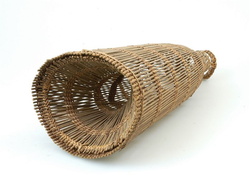 Fuik. Gevlochten visfuik